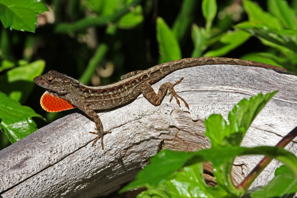 Playa Maguana, Guantanamo.